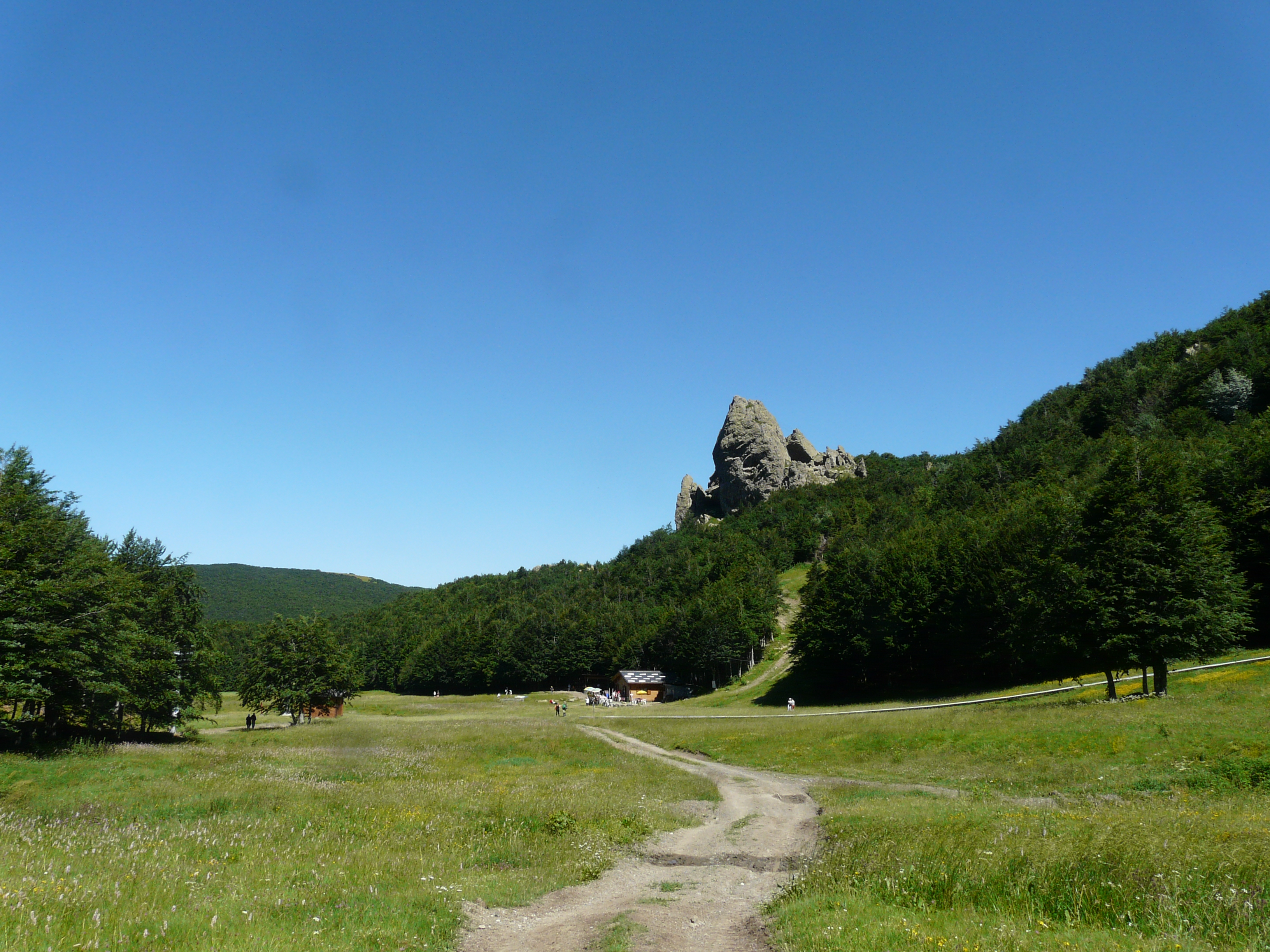 Prato della Cipolla, Santo Stefano d'Aveto, Liguria, Italia